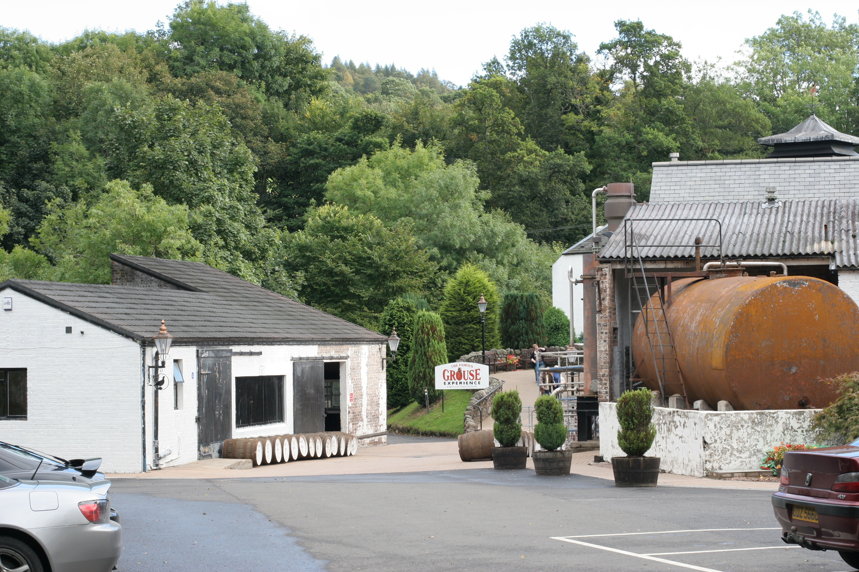 Glenturret_Whisky_Distillery